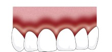 Illustrerende bilde av gingivitt